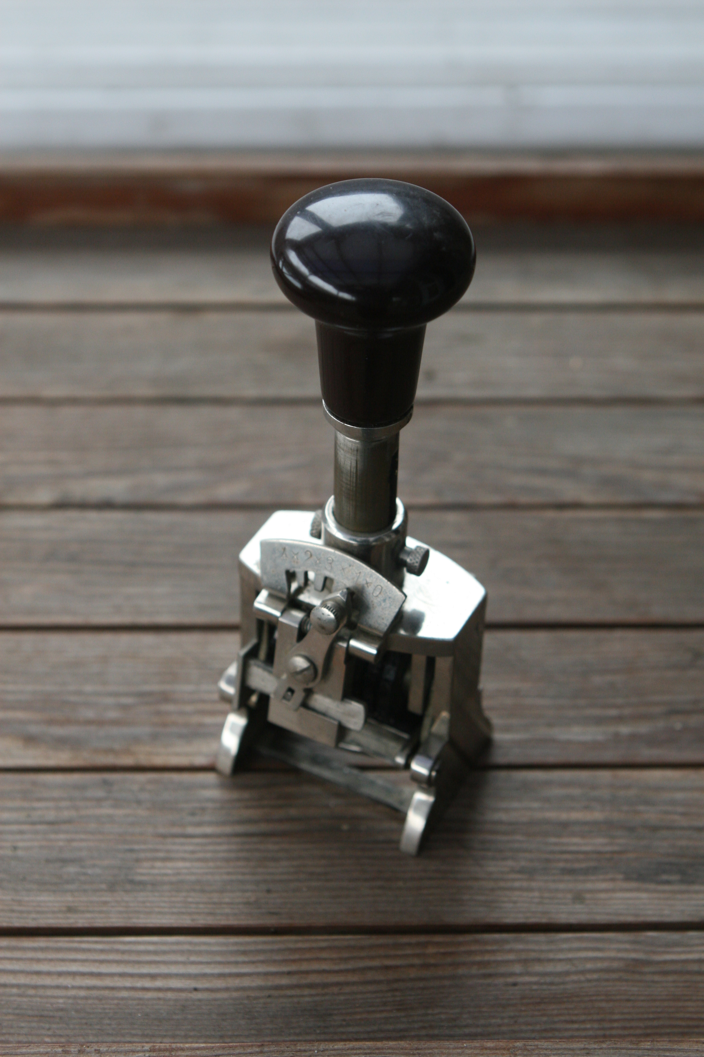 Nummeratørstempel til håndbrug